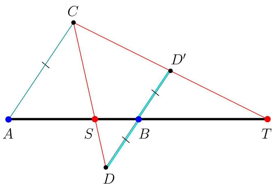 Harmonische Teilung: Konstruktion